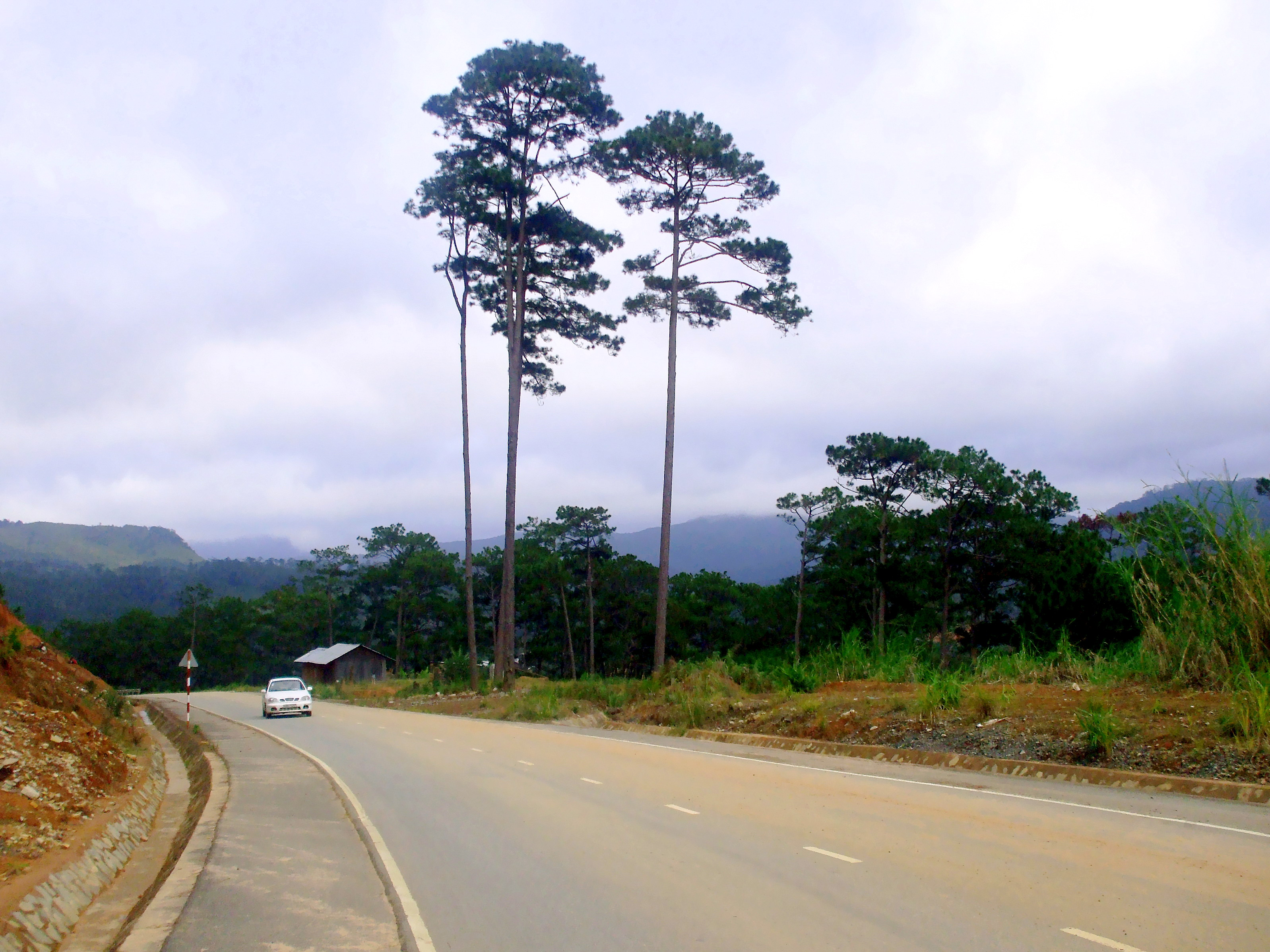 Trên tỉnh lộ 652, đoạn đi qua địa bàn xã Sơn Thái, huyện Khánh Vĩnh, tỉnh Khánh Hòa, Việt Nam.